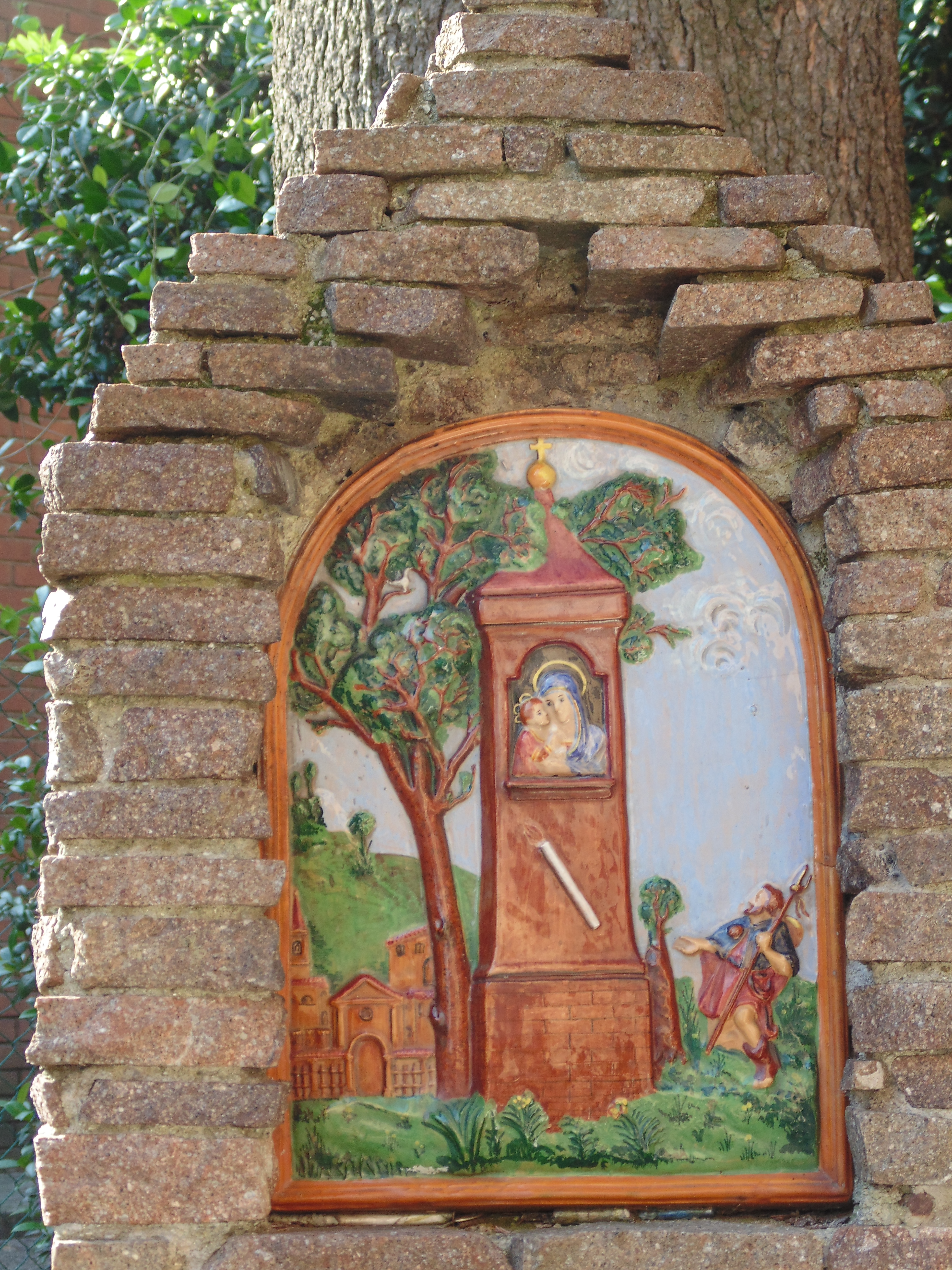 Chiesa di Santa Maria del Piratello - MIBAC This is a photo of a monument which is part of cultural heritage of Italy.